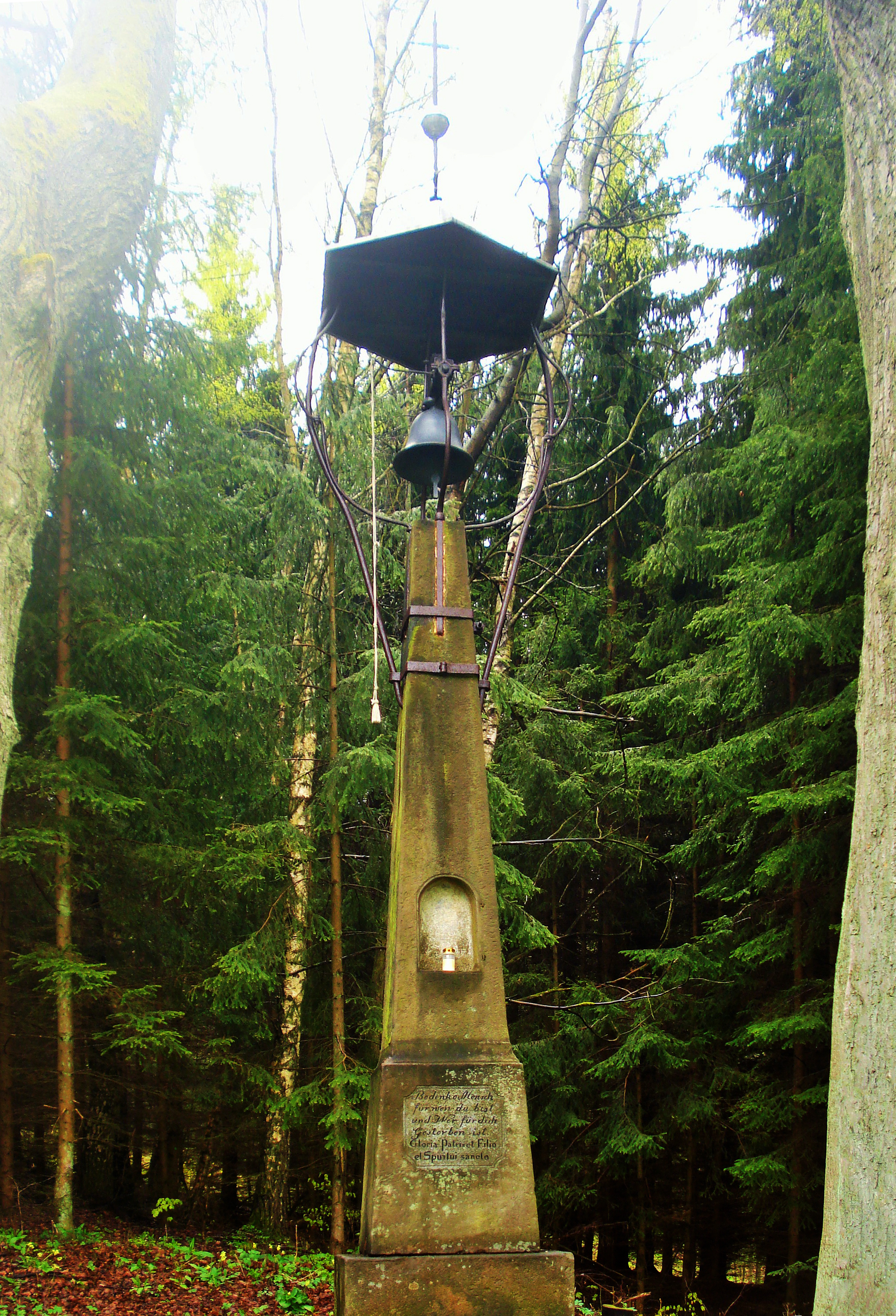 Stara dzwonnica z 1868 roku znajdująca się w dawnej wsi Ostra Góra